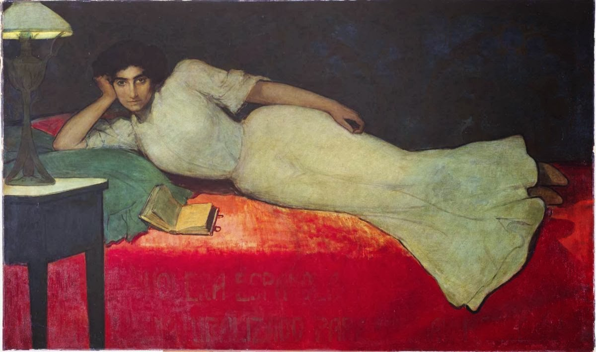 Lectura. Óleo sobre papel pegado a lienzo. 95 x 160 cm.